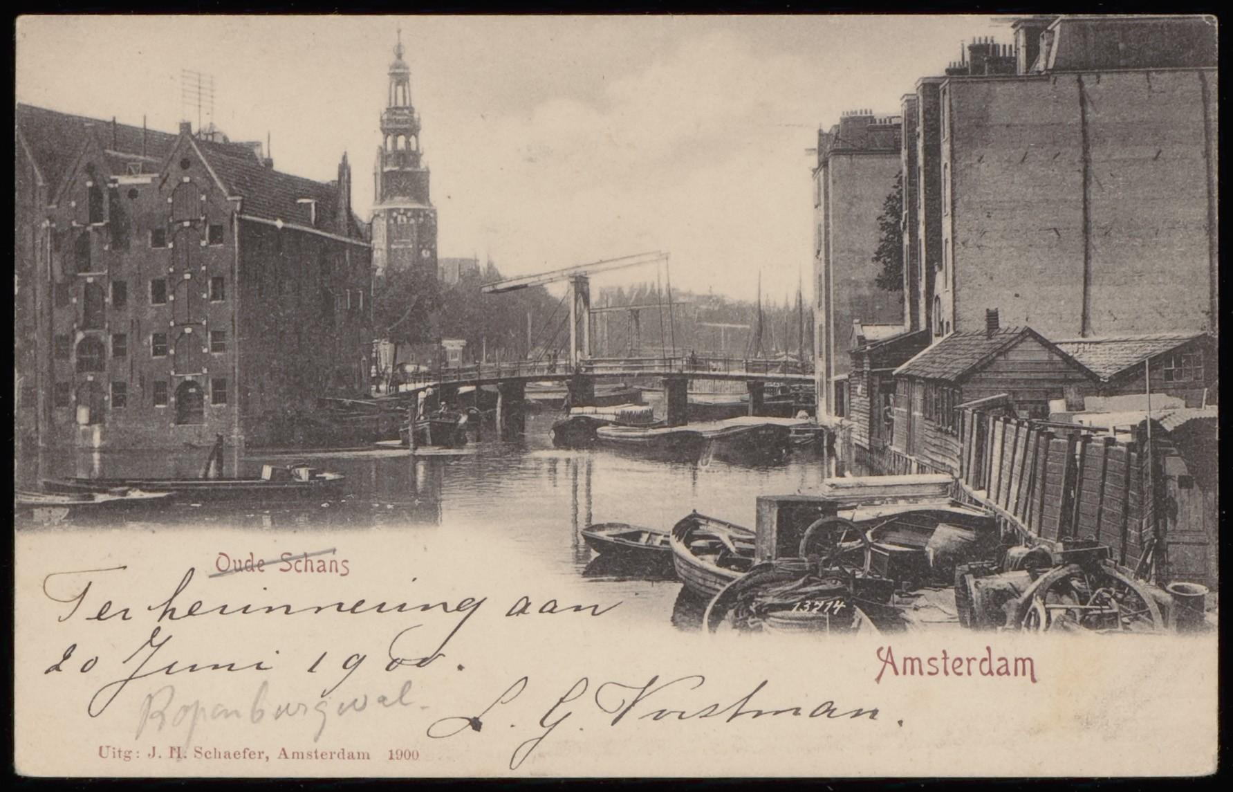 Beschrijving Rapenburgergracht met links de Uilenburgergracht Op de achtergrond de Montelbaenstoren en de klapbrug in de Nieuwe Uilenburgerstraat. Rechts de achterzijde van Uilenburg. Uitgave J.H. Schaefer, Amsterdam Documenttype prentbriefkaart Vervaardiger Schaefer, J.H. (uitgever) Collectie Collectie Stadsarchief Amsterdam: prentbriefkaarten Datering 1900 ca. Geografische naam Uilenburgergracht Rapenburgergracht Uilenburg Inventarissen Afbeeldingsbestand PBKD00219000002 Generated with Dememorixer